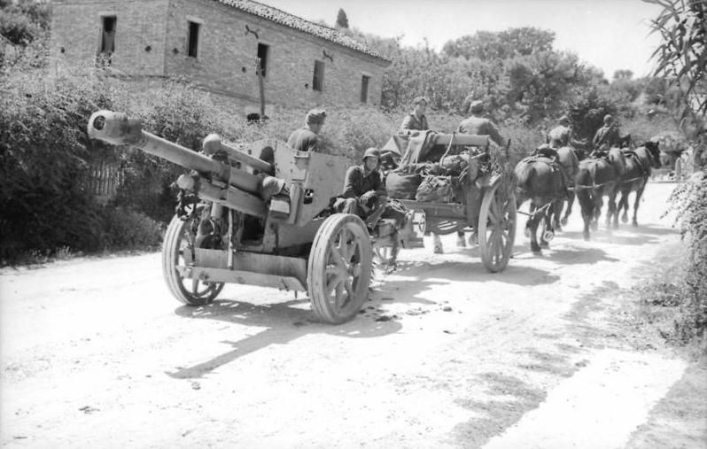 Ostfront.- Drei Artilleristen an leichter Haubitze mit gegossenen Speichenrädern und Hartgummireifen für motorisierten Zug in Feuerstellung / beim Abschuss